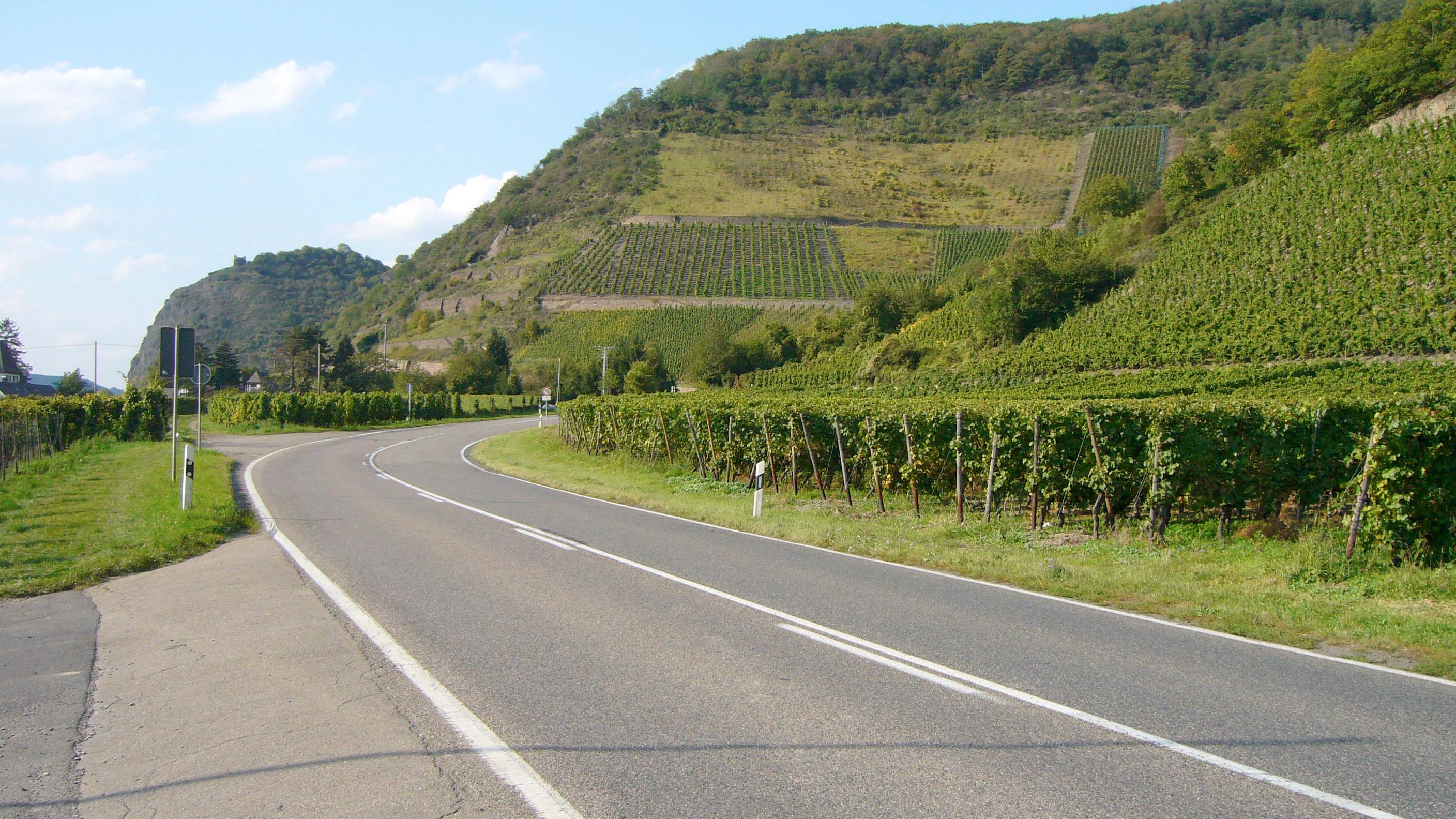 Weinberg bei Leutesdorf am Rhein